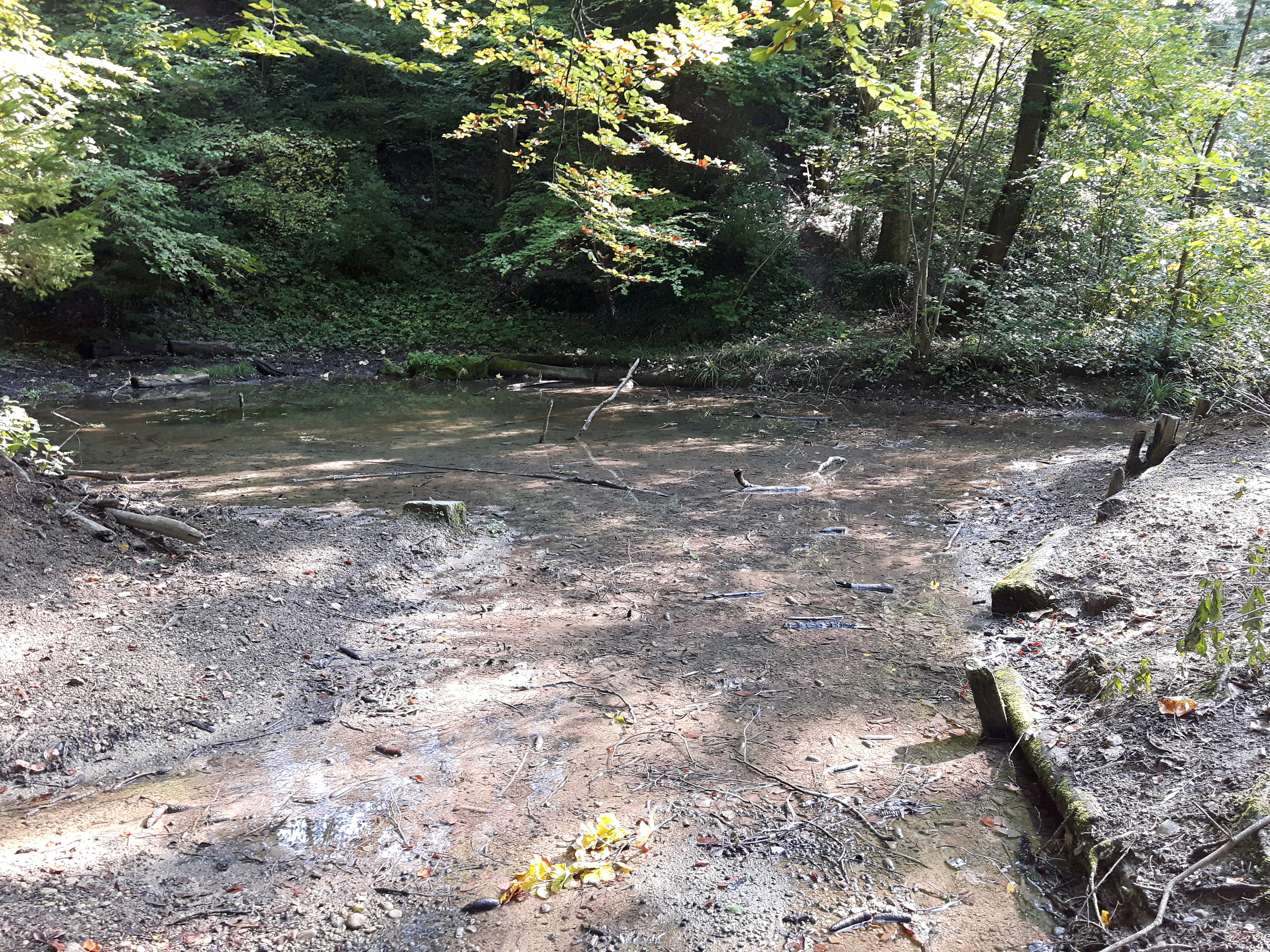 Tümpel am Weidtobelbach im Loch direkt vor dessen Mündung in den Fürtlibach mit Grenzstein (Bildmitte) Zürich (linkes Bachufer) und Oberengstringen (rechtes Ufer)